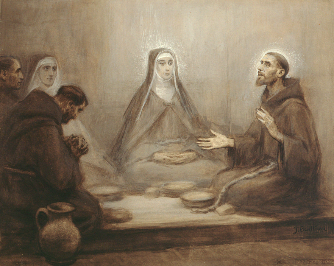 Éxtasis de Francisco y Clara durante una frugal comida.